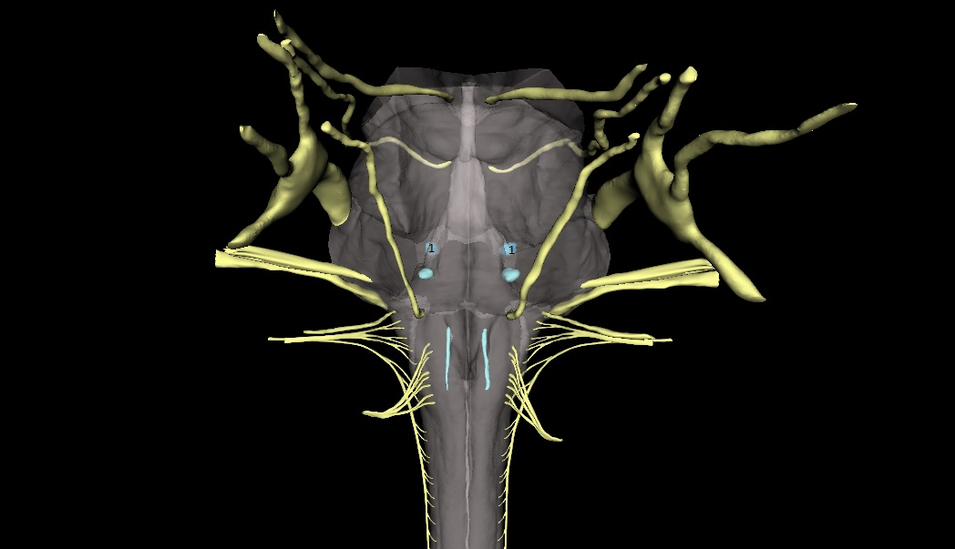 1. N. trigeminoaren nukleo eragilea